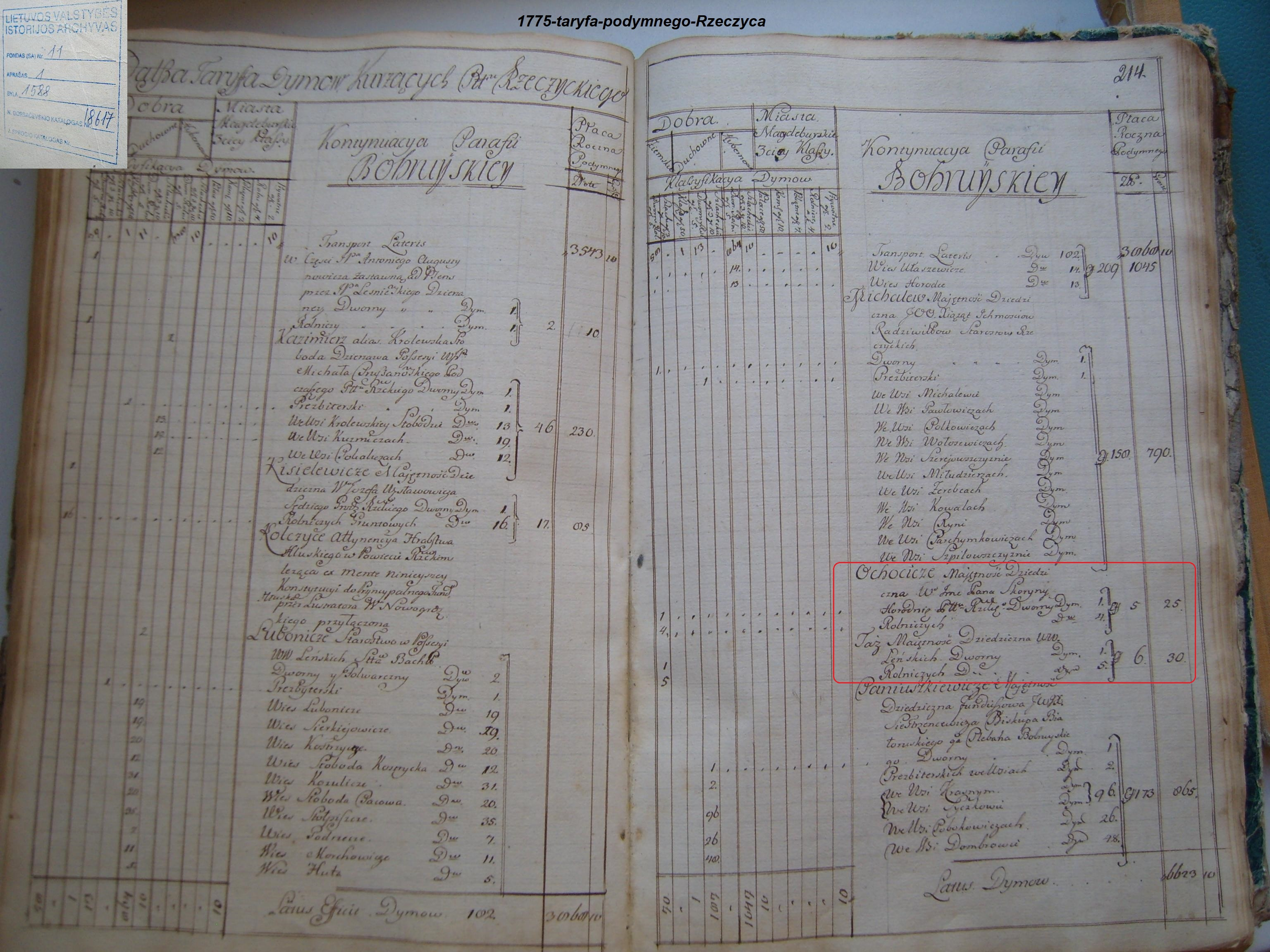 Речицкий павет, Минского воеводства. Тарифа подымного налогообложения. 1775 год